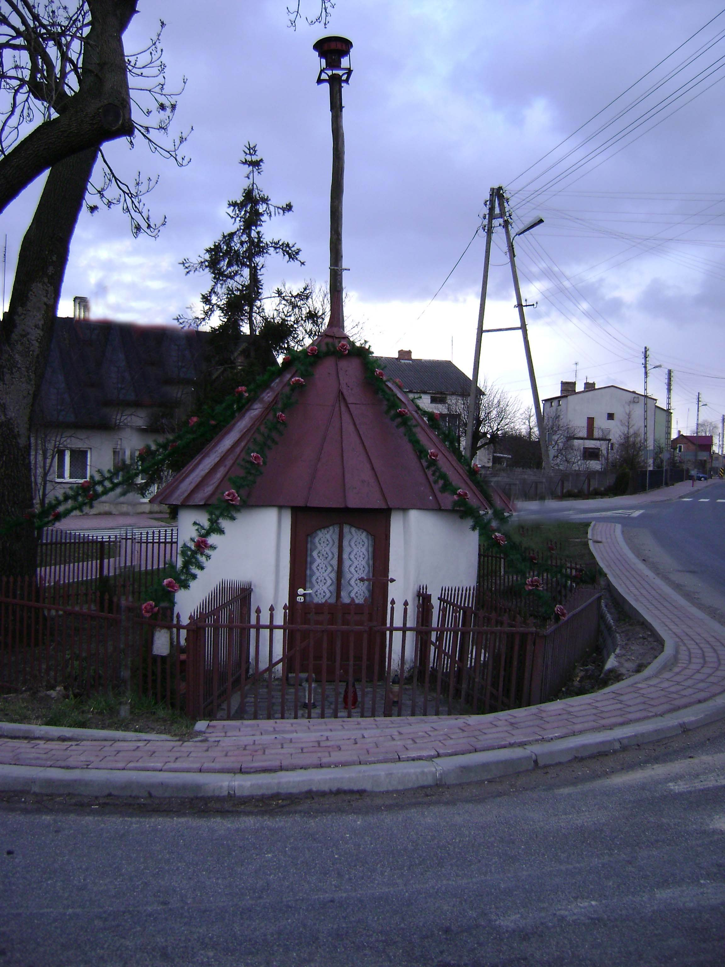 Kapliczka choleryczna